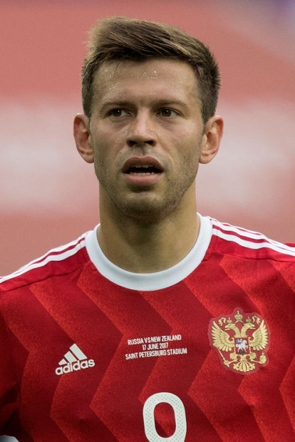 Россия - Новая Зеландия